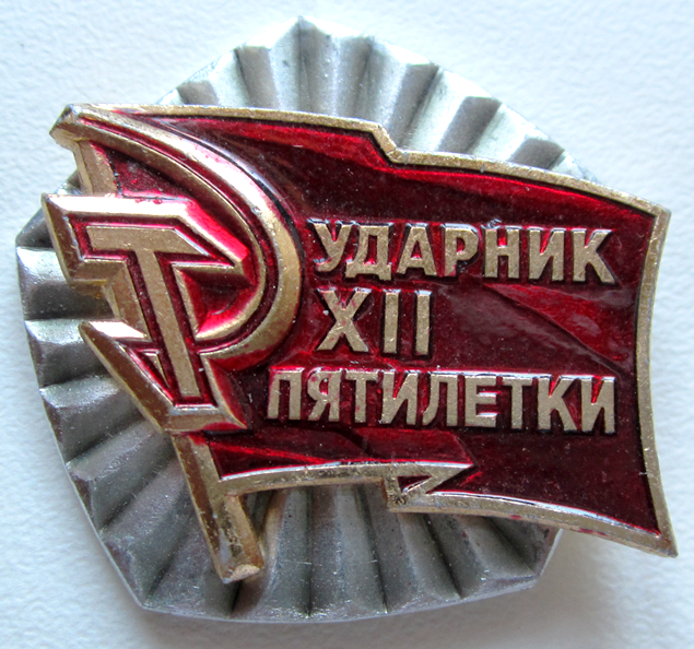 Ударник XII пятилетки, общесоюзный знак